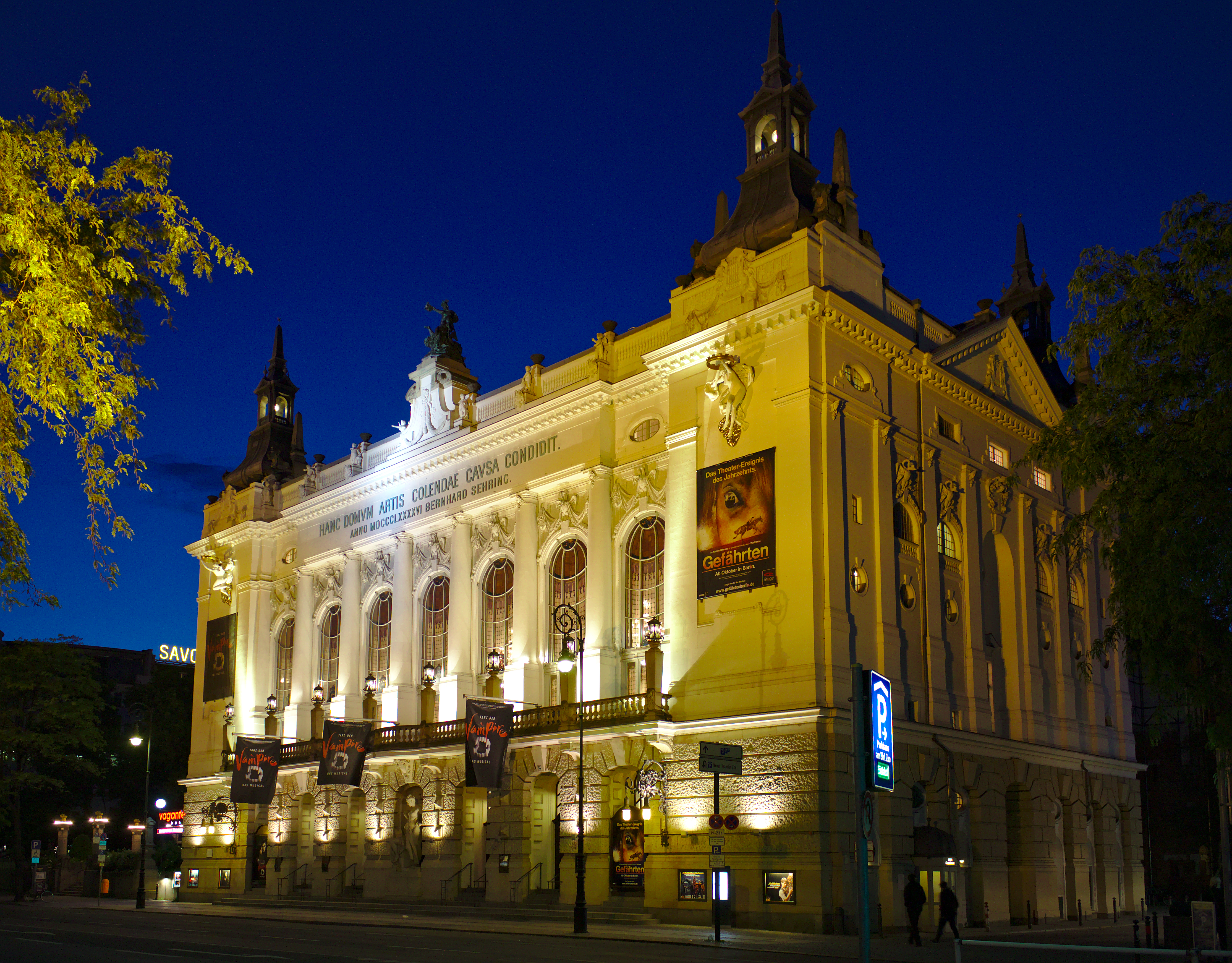 Theater des Westens, Berlin Charlottenburg, Nachtansicht